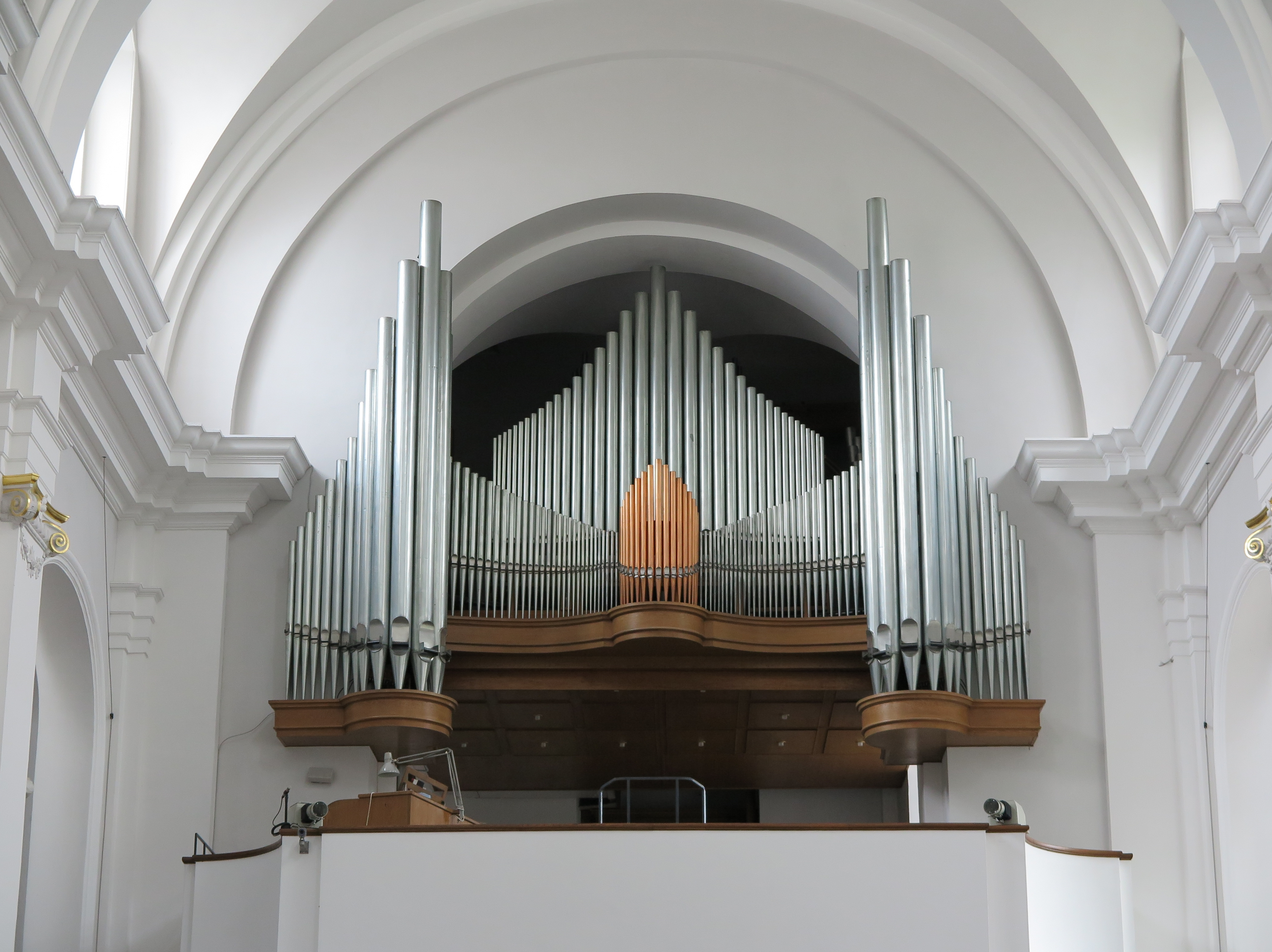 Orgel in St. Johann Baptist in Aachen-Burtscheid.